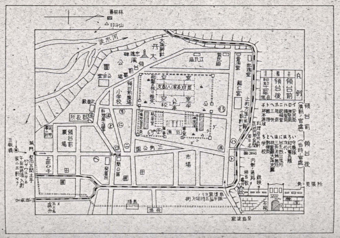 中文（台灣）: 圖上標有大溪在日本領台前後的設施名稱與位置